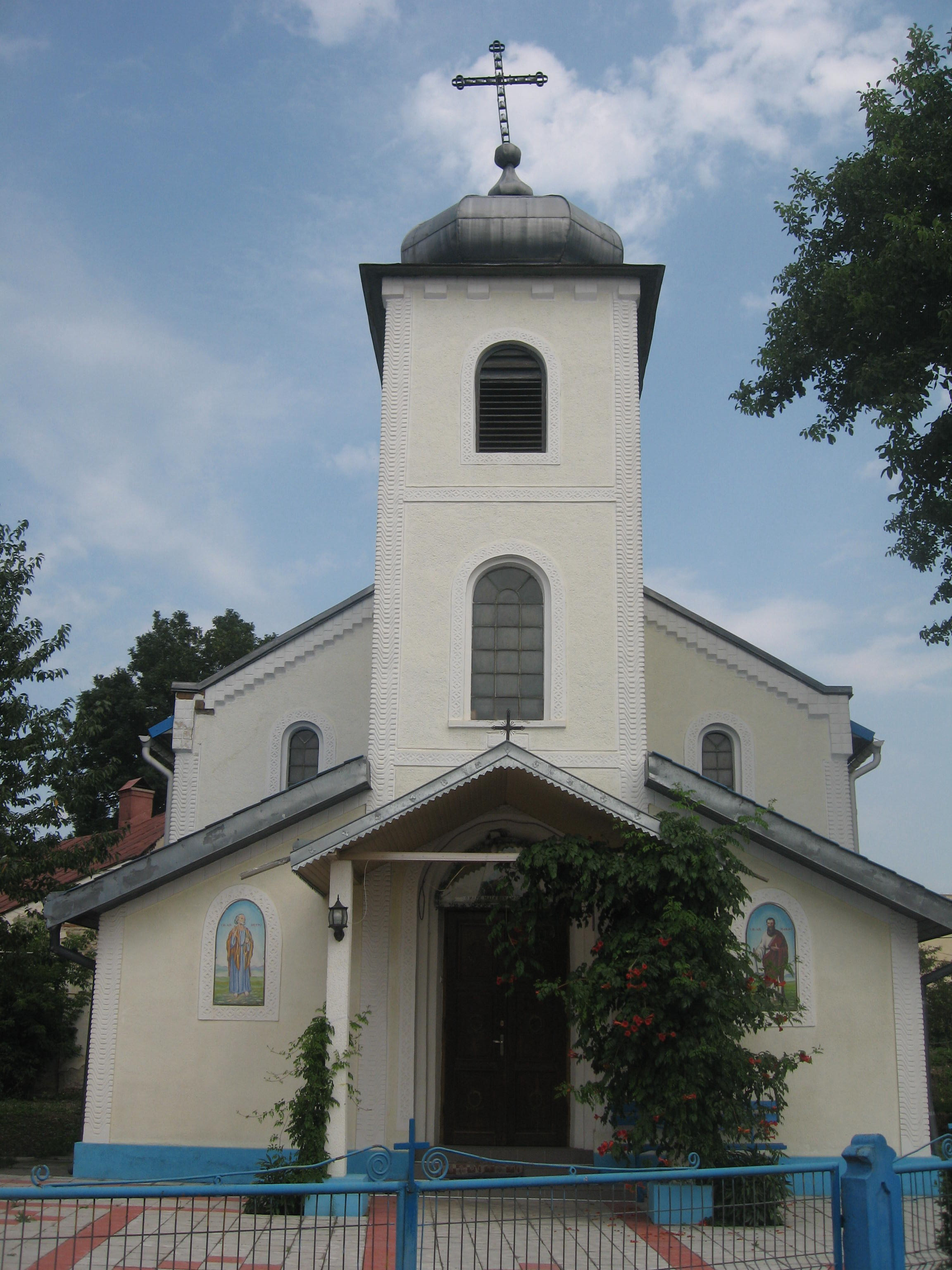 Biserica greco-catolica din Radauti